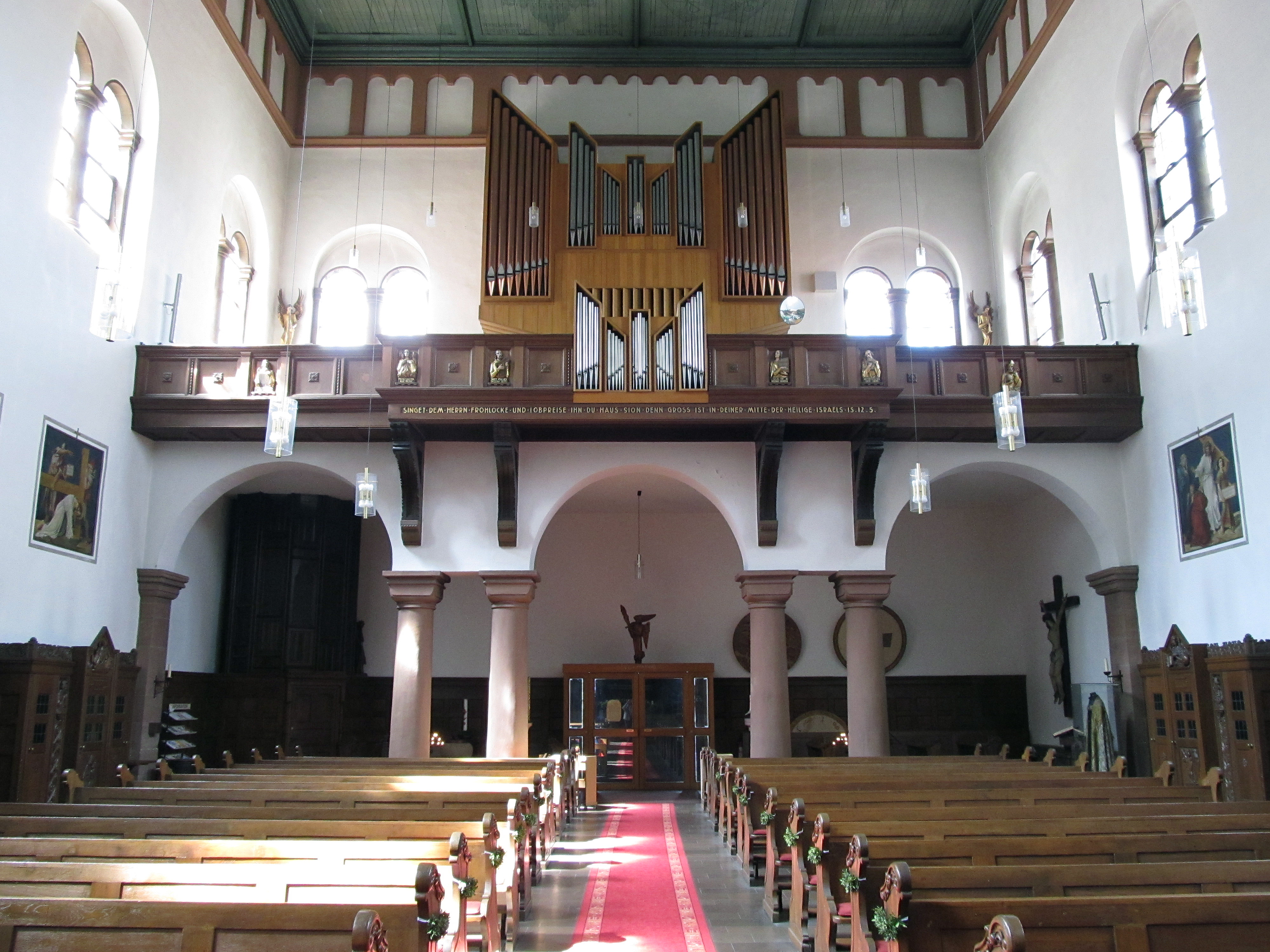 Blick zur Empore und dem Orgelprospekt der St. Michaelskirche (Homburg, Saarland)